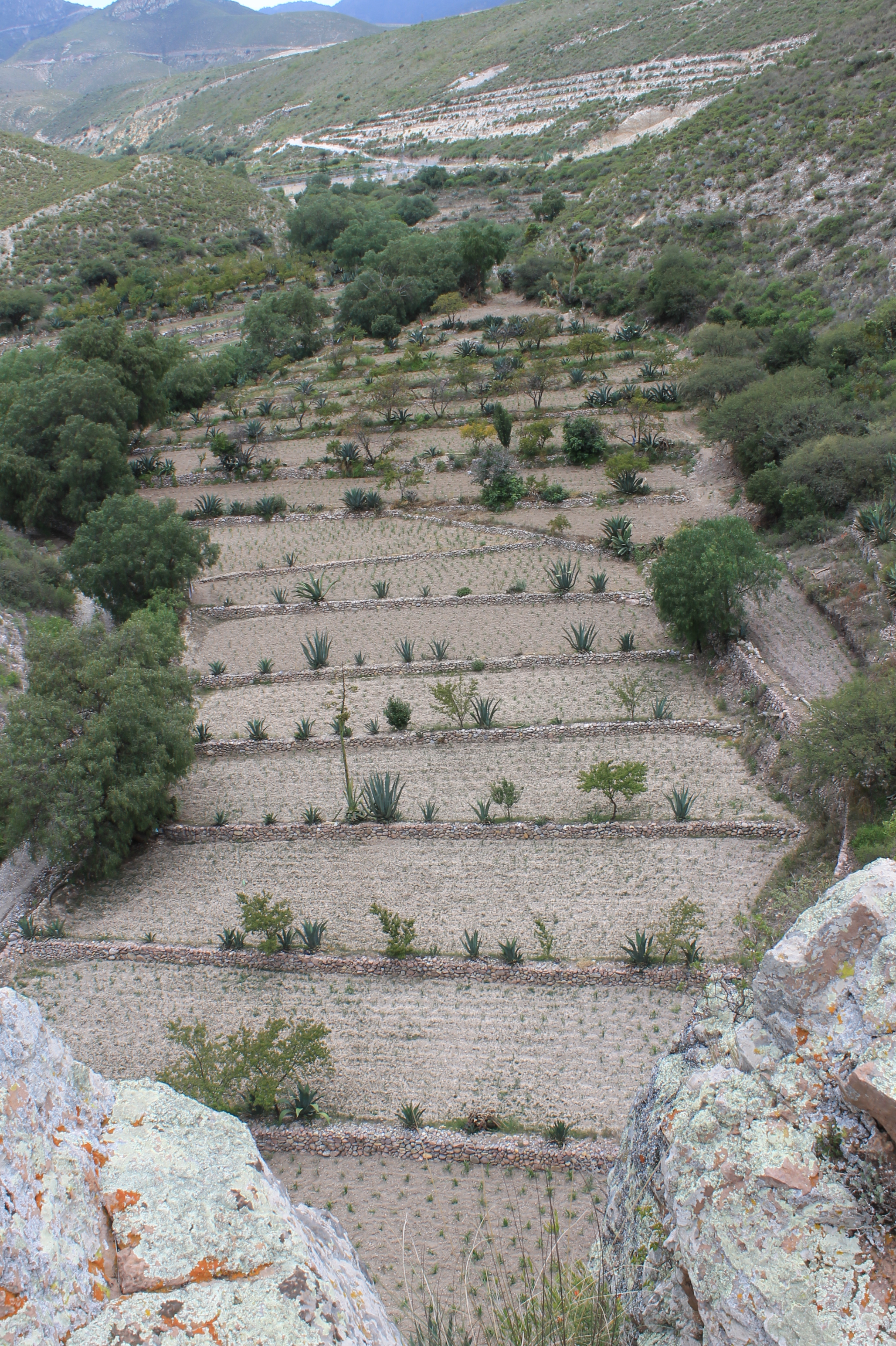 El Olivo Ixmiquilpan Hidalgo México